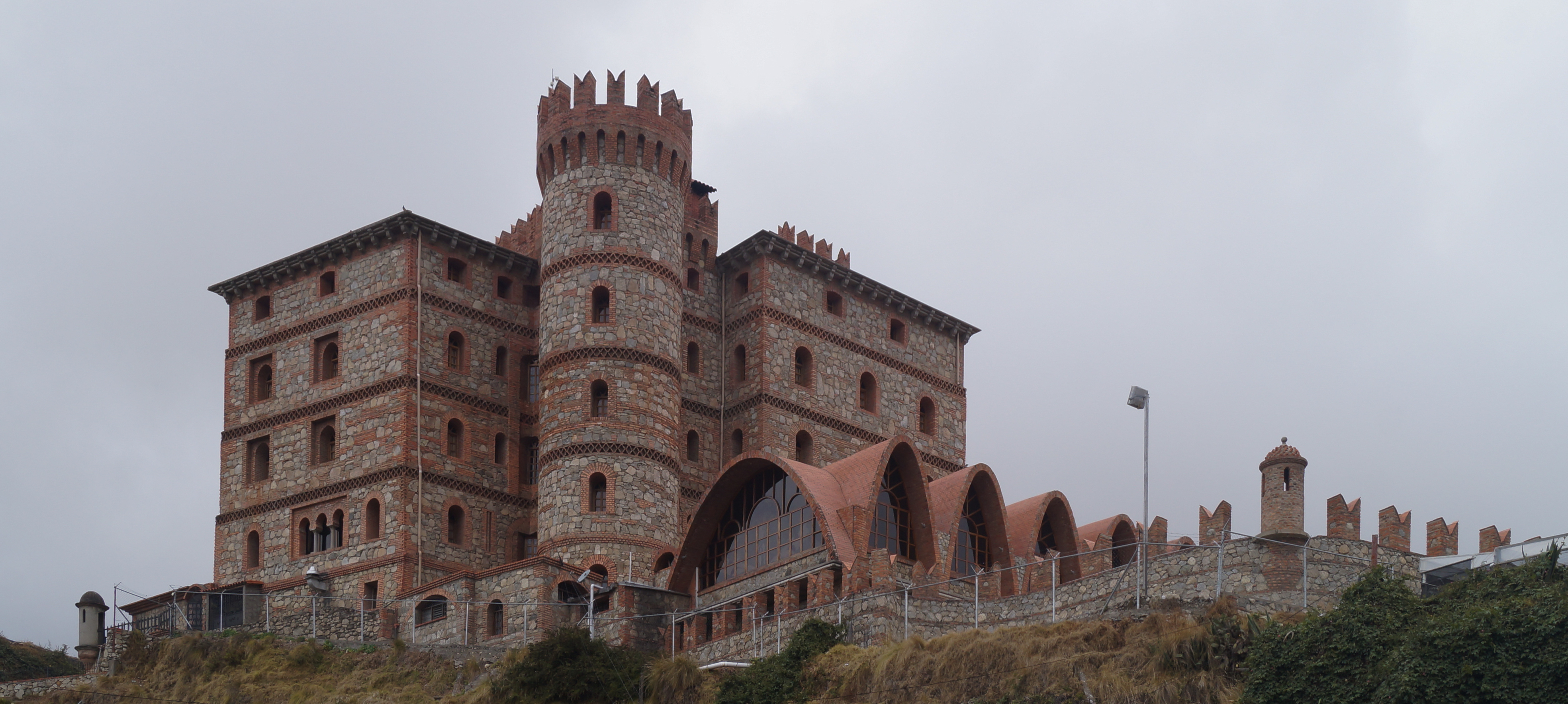 Hotel Castillo San Ignacio. El edificio es un enorme castillo de piedra que evoca las construcciones de la Europa medieval.Cada habitación es diferente. El Bar-restaurante conserva el ambiente del castillo, con vigas de madera, paredes de piedra, mesas de caballetes y cocineras vestidas como en siglos pasados. Mérida. Venezuela.